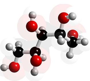 molecula de xilitol